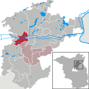 Marienwerder in Brandenburg (Country) - District Barnim